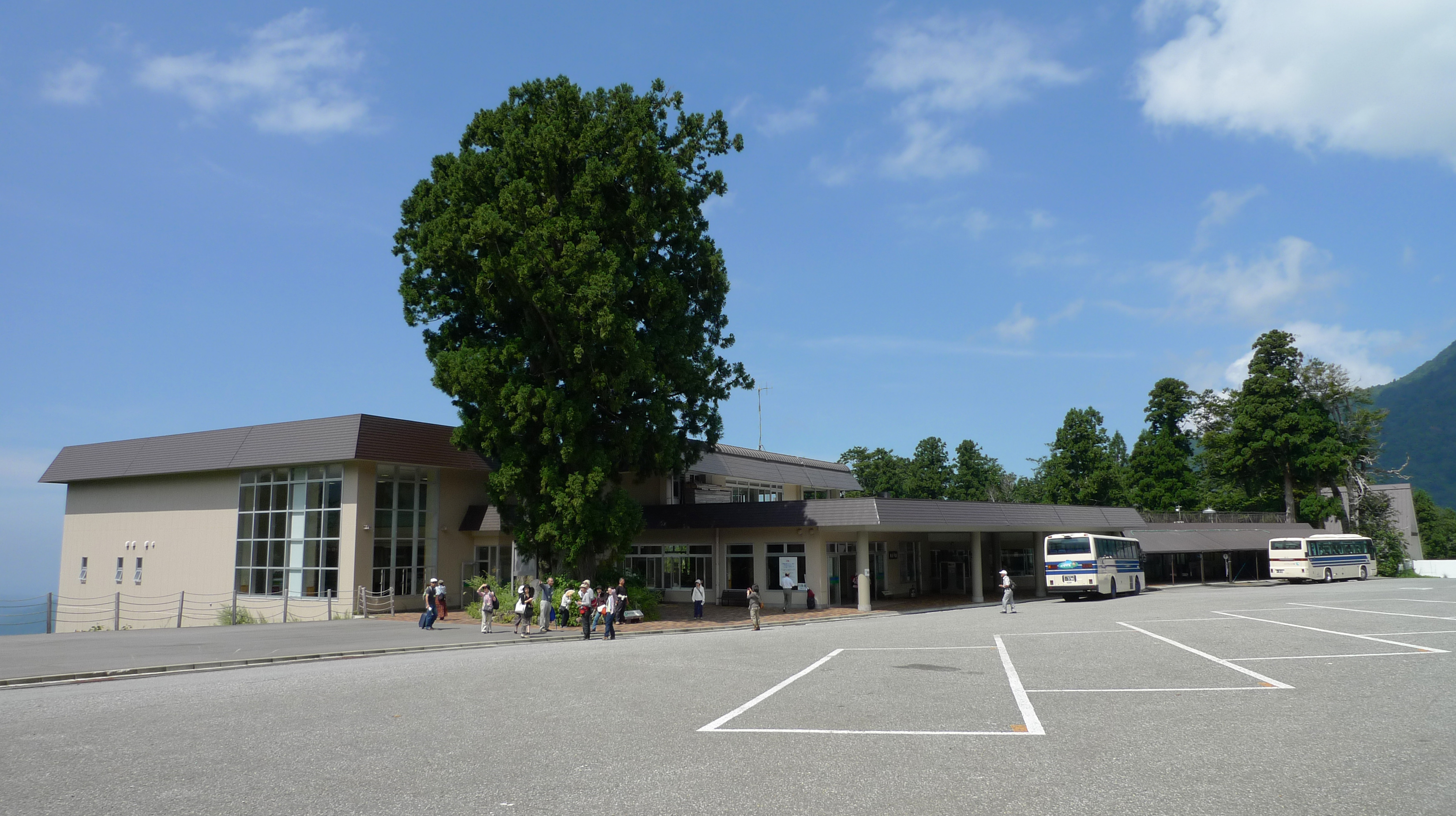 立山ケーブルカー美女平駅